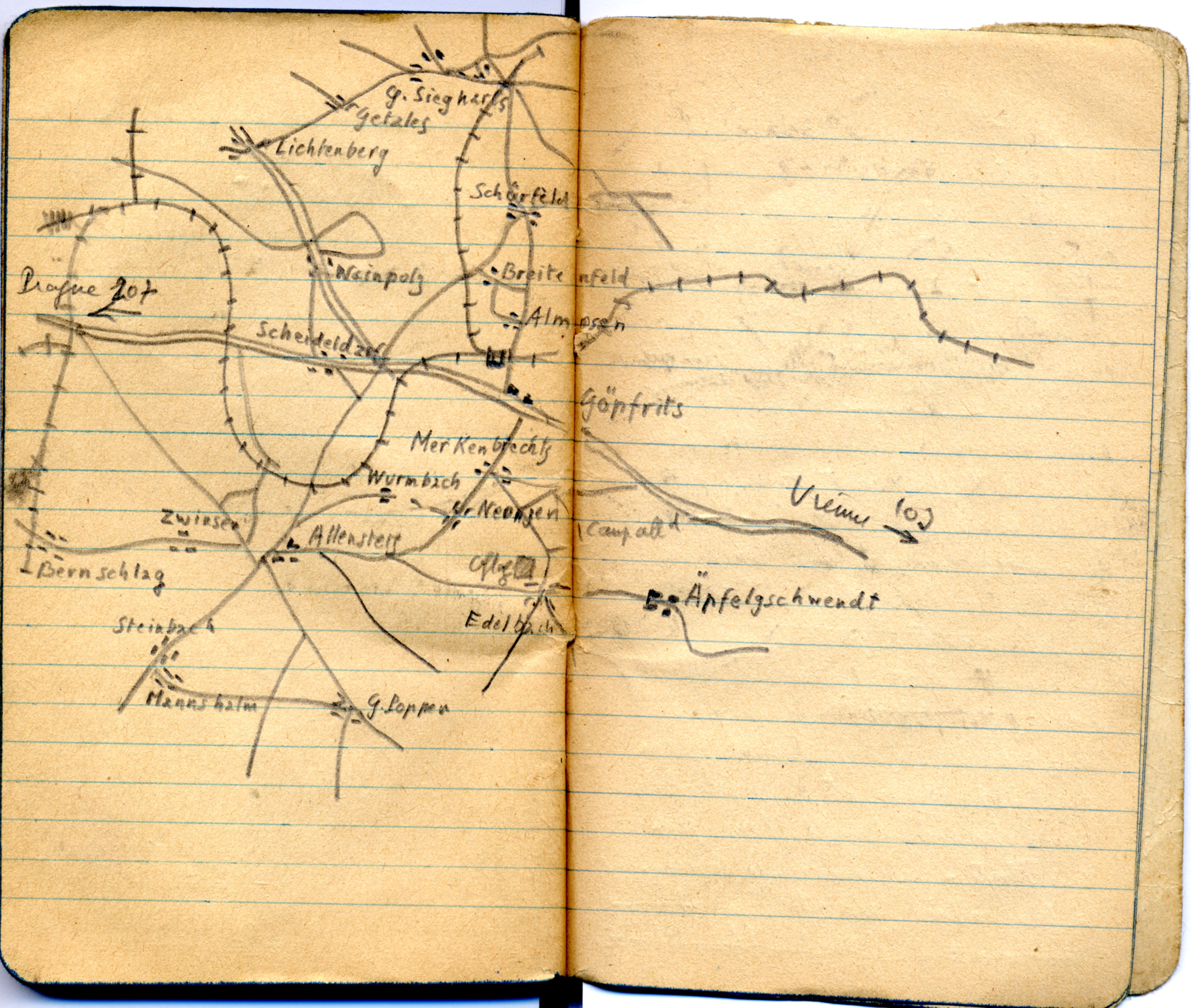 Carte de situation réalisée en mai 1945 par Jean-Louis Vernier, prisonnier durant la seconde guerre mondiale à l'Oflag XVII-A. Extrait du carnet ramené de captivité.